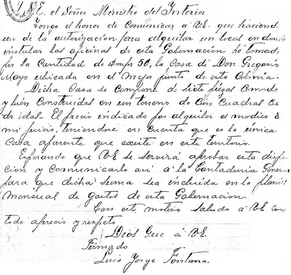 Carta de Fontana sobre la casa de Gregorio Mayo usada para la gobernación del Chubut